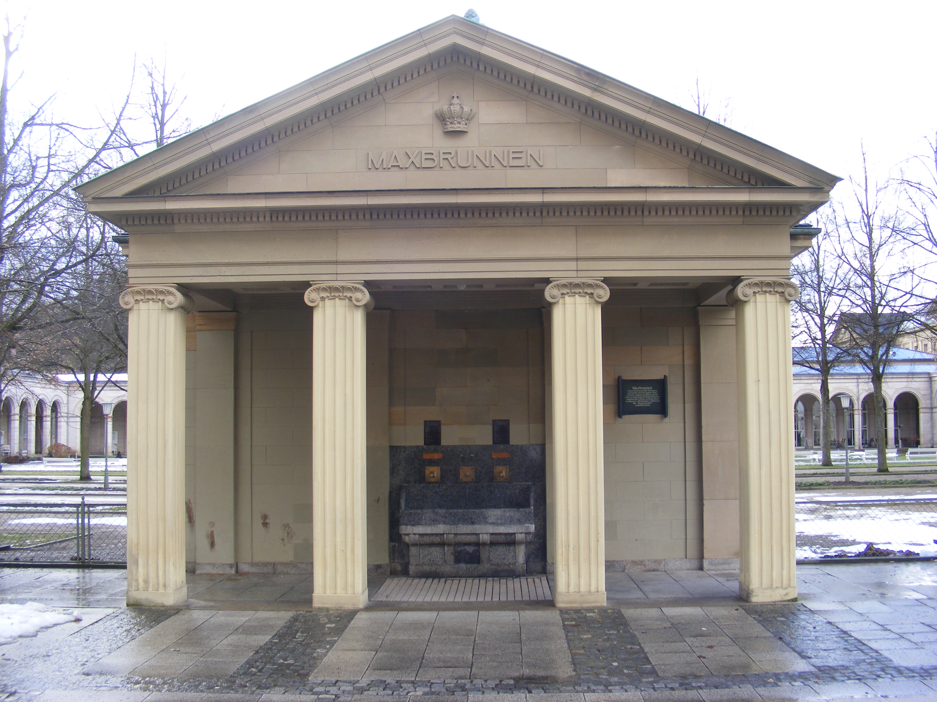 Bad Kissingen - Maxbrunnen, Frontansicht.